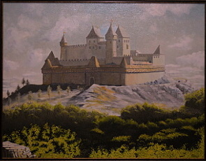 Hrad Helfenburk, olej na plátně 90x70 cm